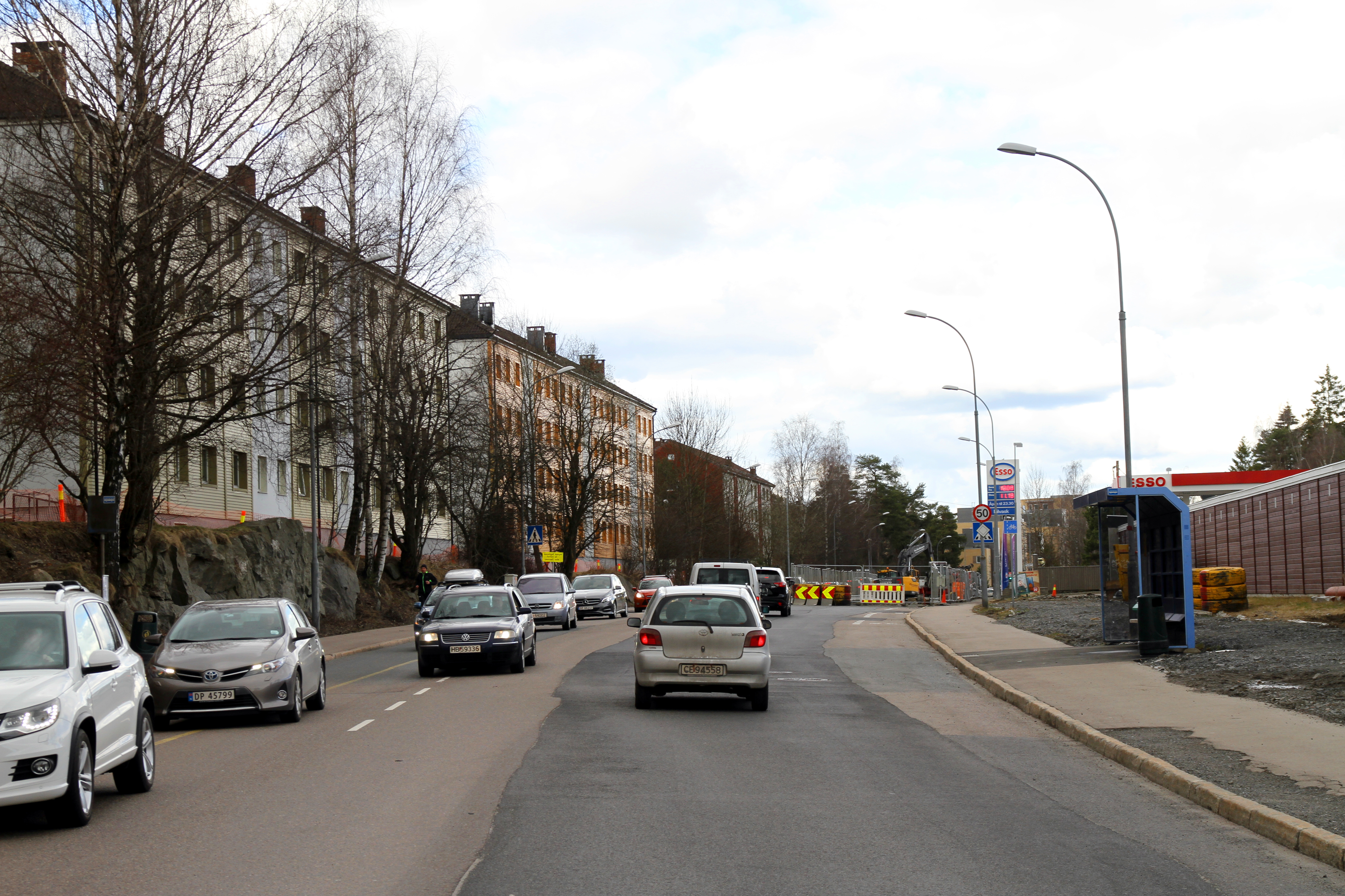 Hellerudveien i Oslo.